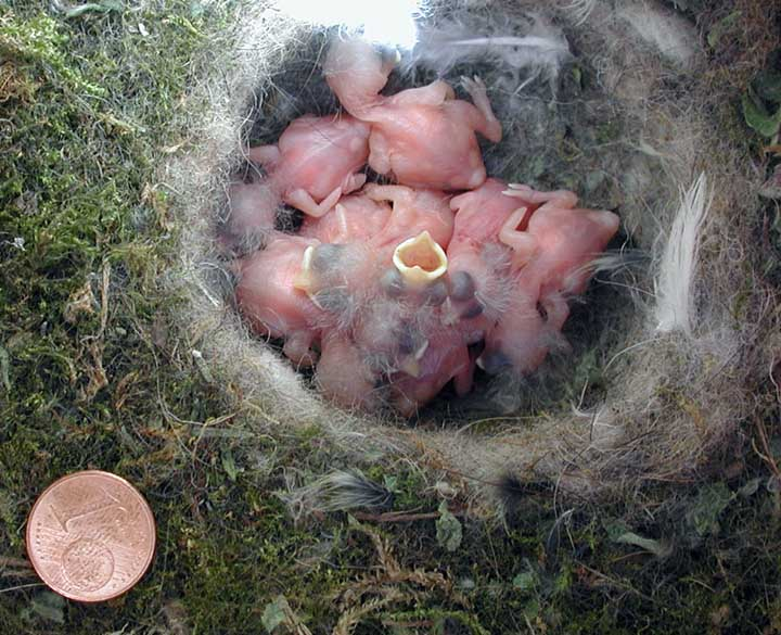 Meisenkueken wenige Tage alt